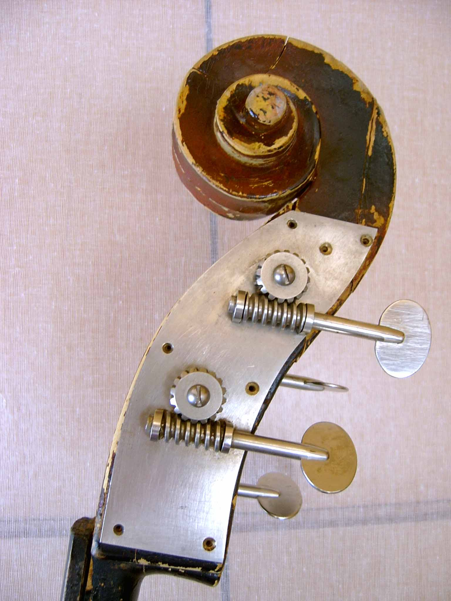 Hans Reedi kontrabassi kruviplaadid